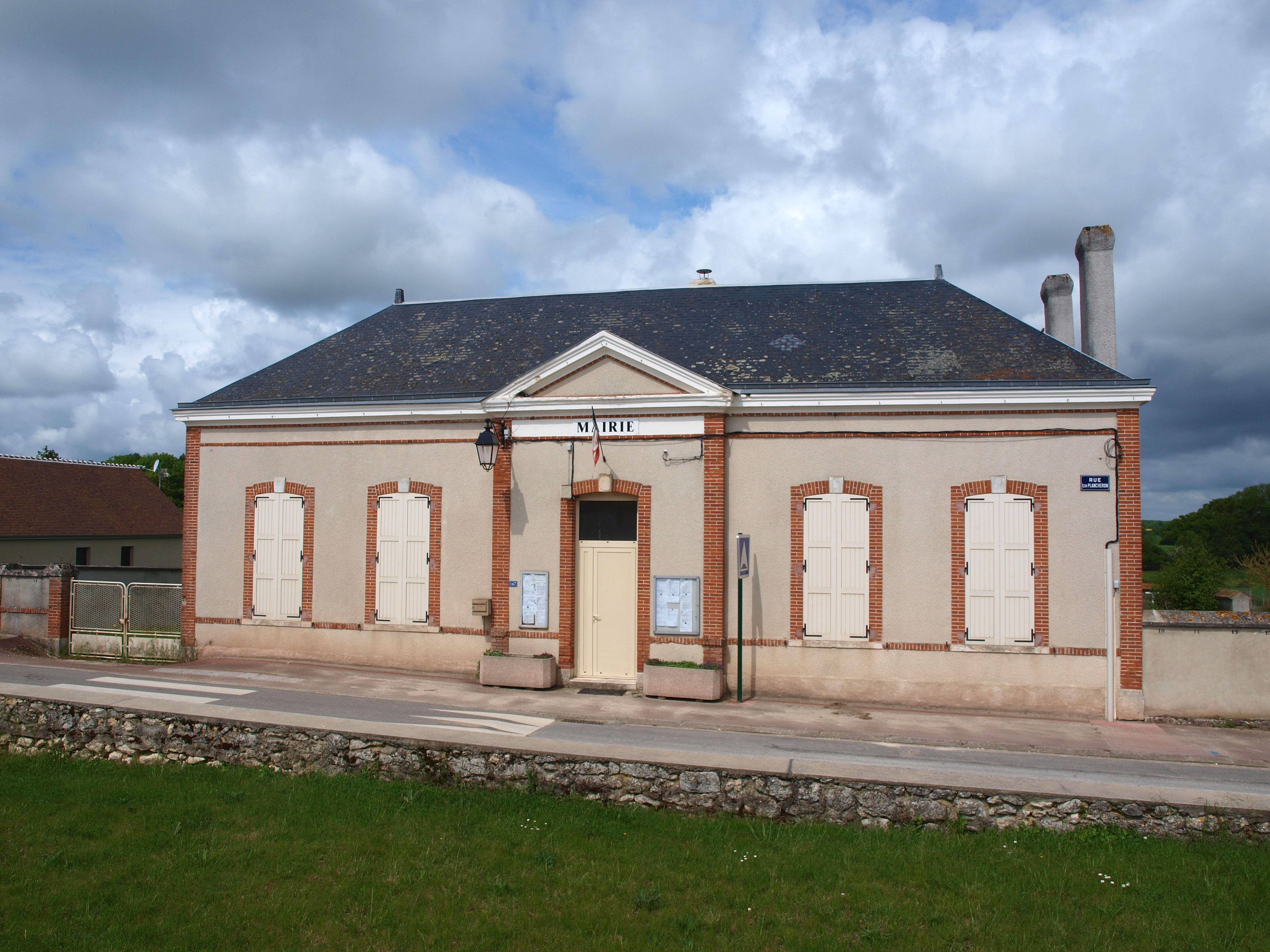 Cortrat (Loiret, France) ; la mairie